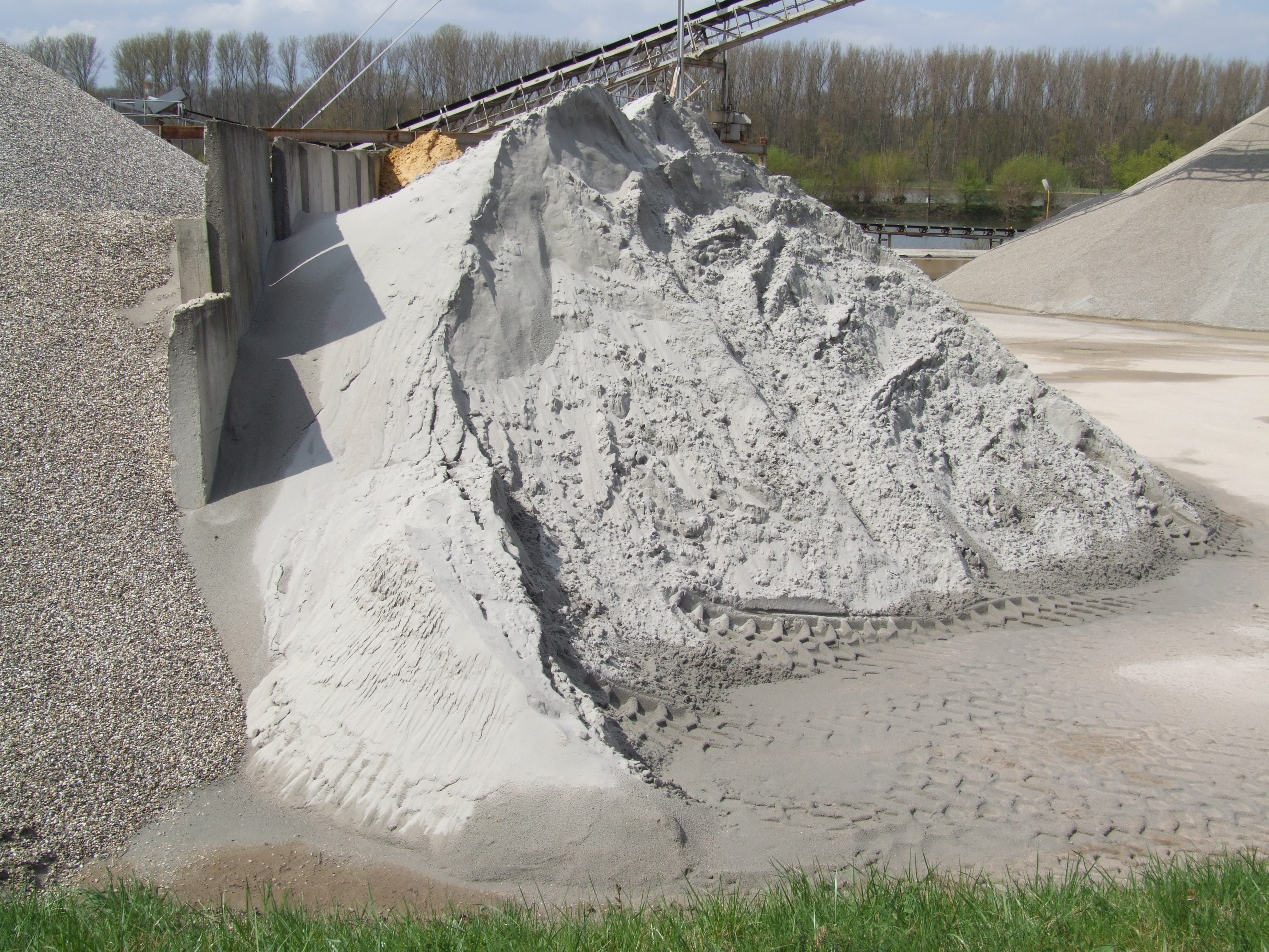 Rheinsand, Kieswerk Krieger, bei Rheinhausen